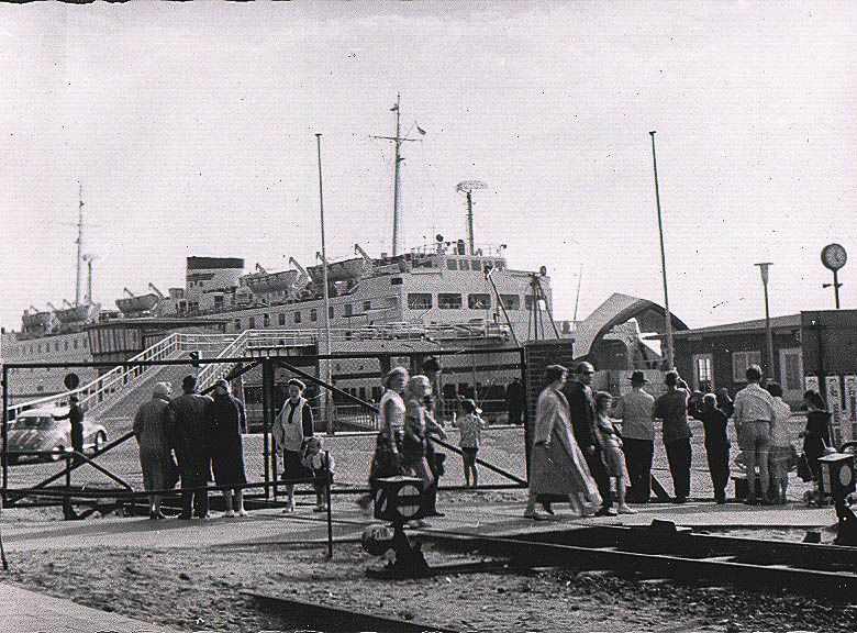 Fähranleger von Großenbode Kai